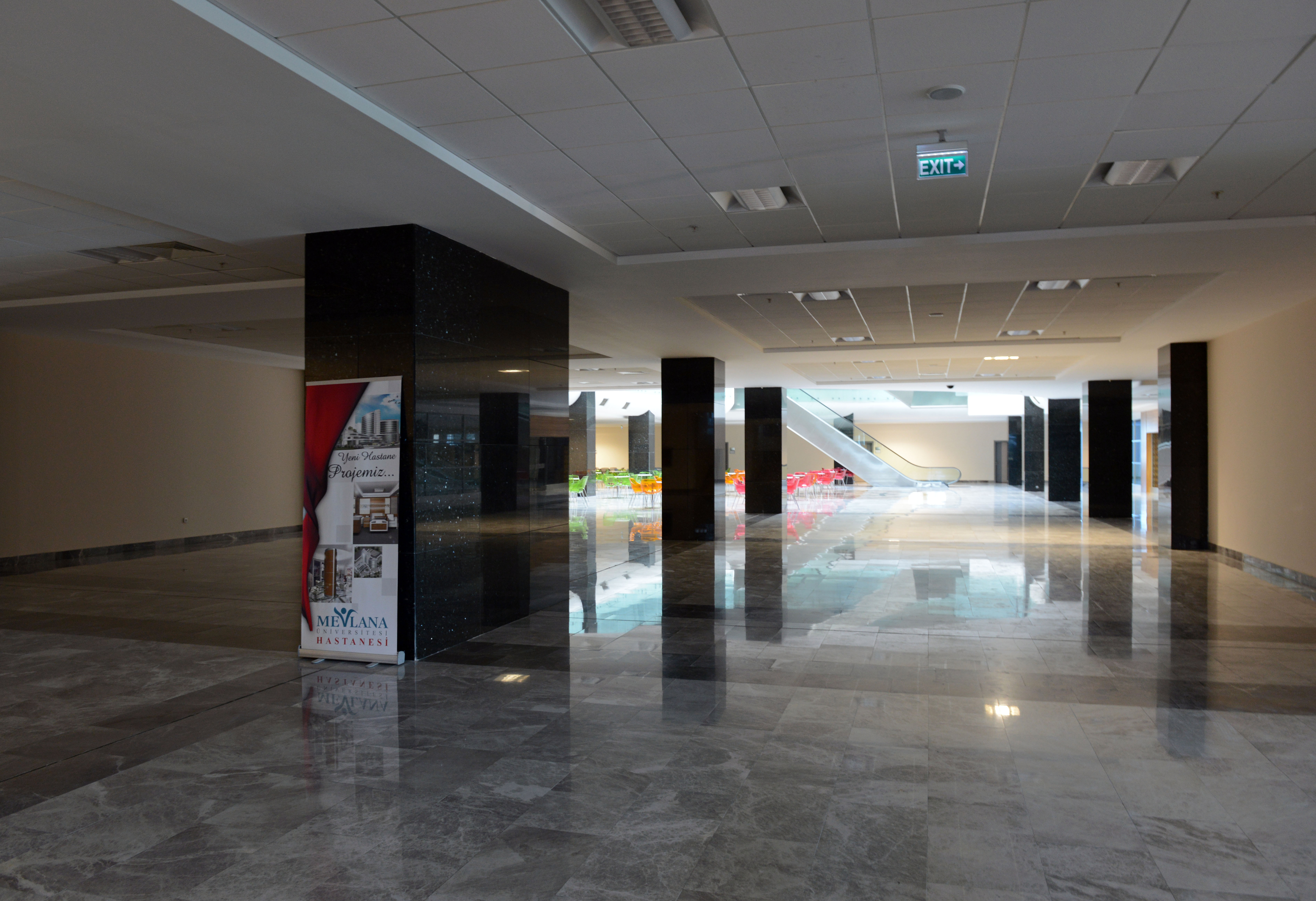 Mevlana Üniversitesi iç mekan görünüm.